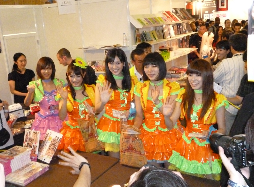 Idoling!!! Handshake session at Japan Expo 2012. L-R: Mai Endo, Erica Tonooka, Rurika Yokoyama, Nao Asahi and Yurika Tachibana